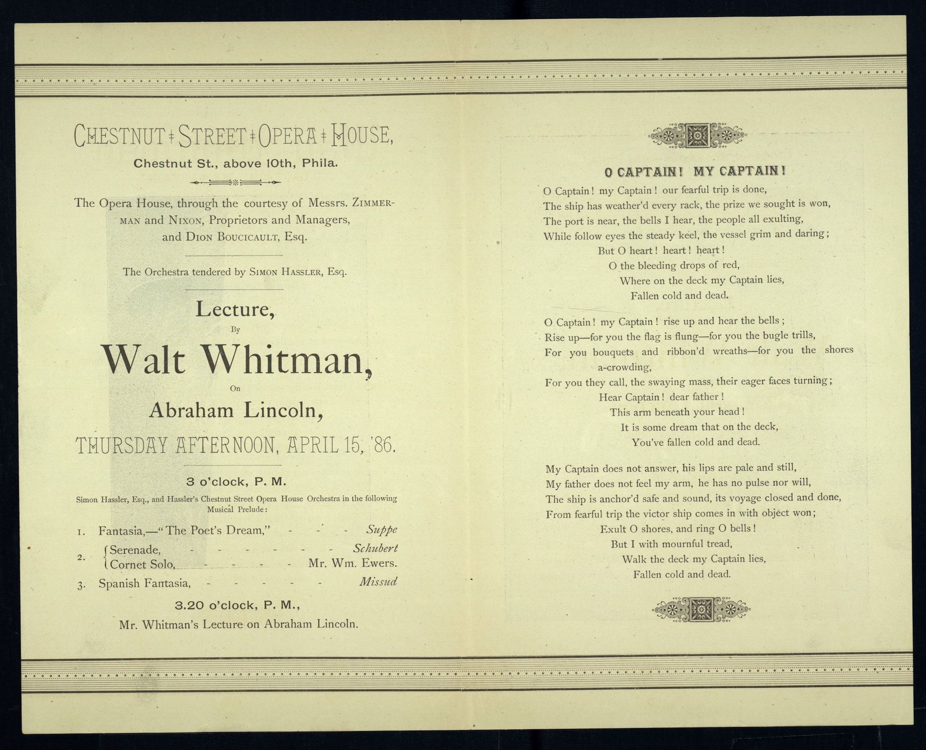 וולט ויטמן, הזמנה להרצאה על לינקולן